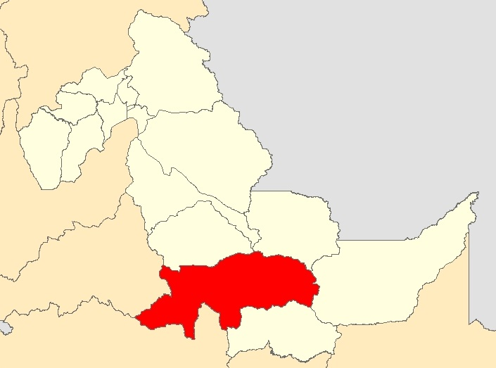 Mapa distrito Raimondi,Ucayali - Perú